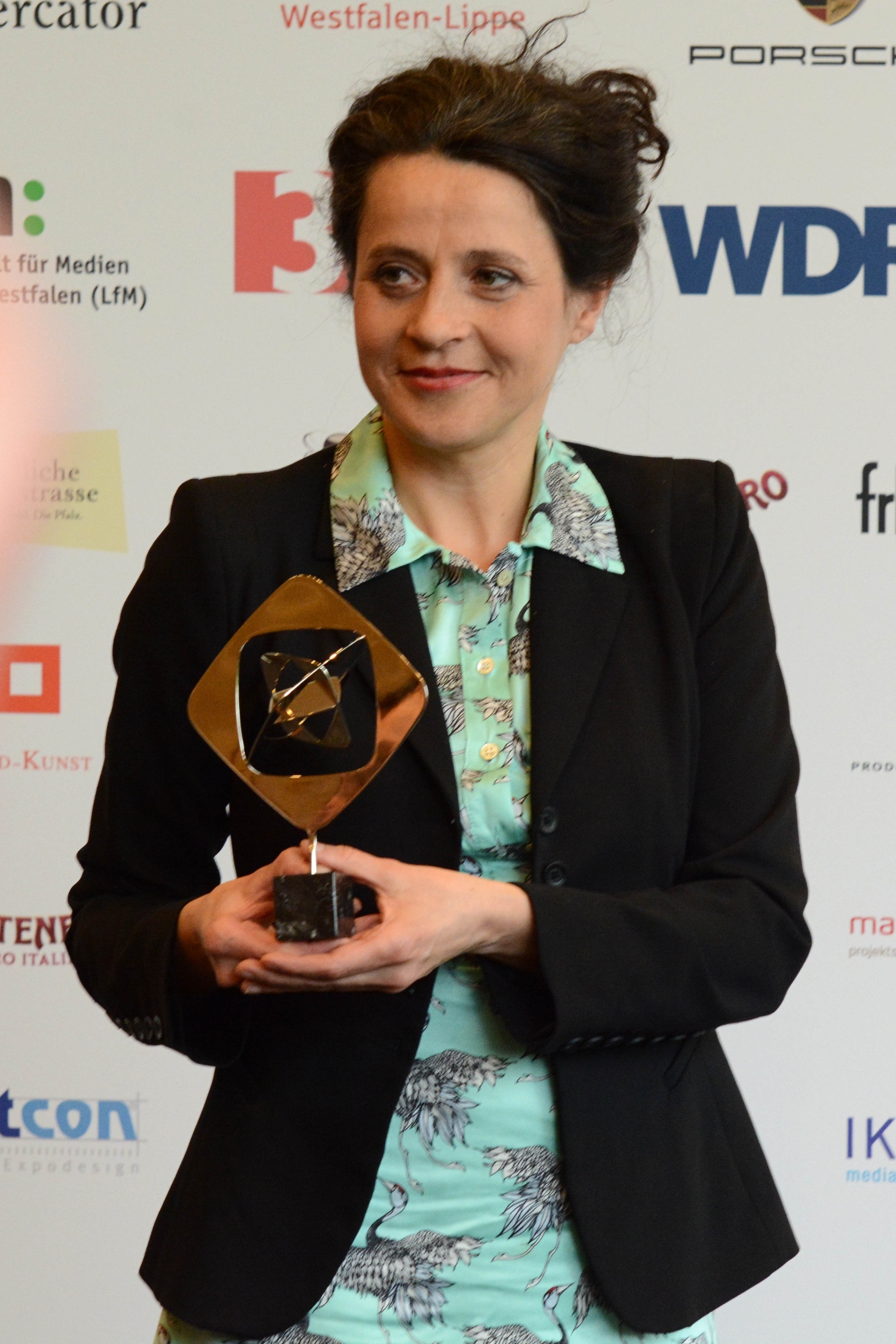 Katrin Rothe bei der Verleihung des Grimme-Preises 2014.